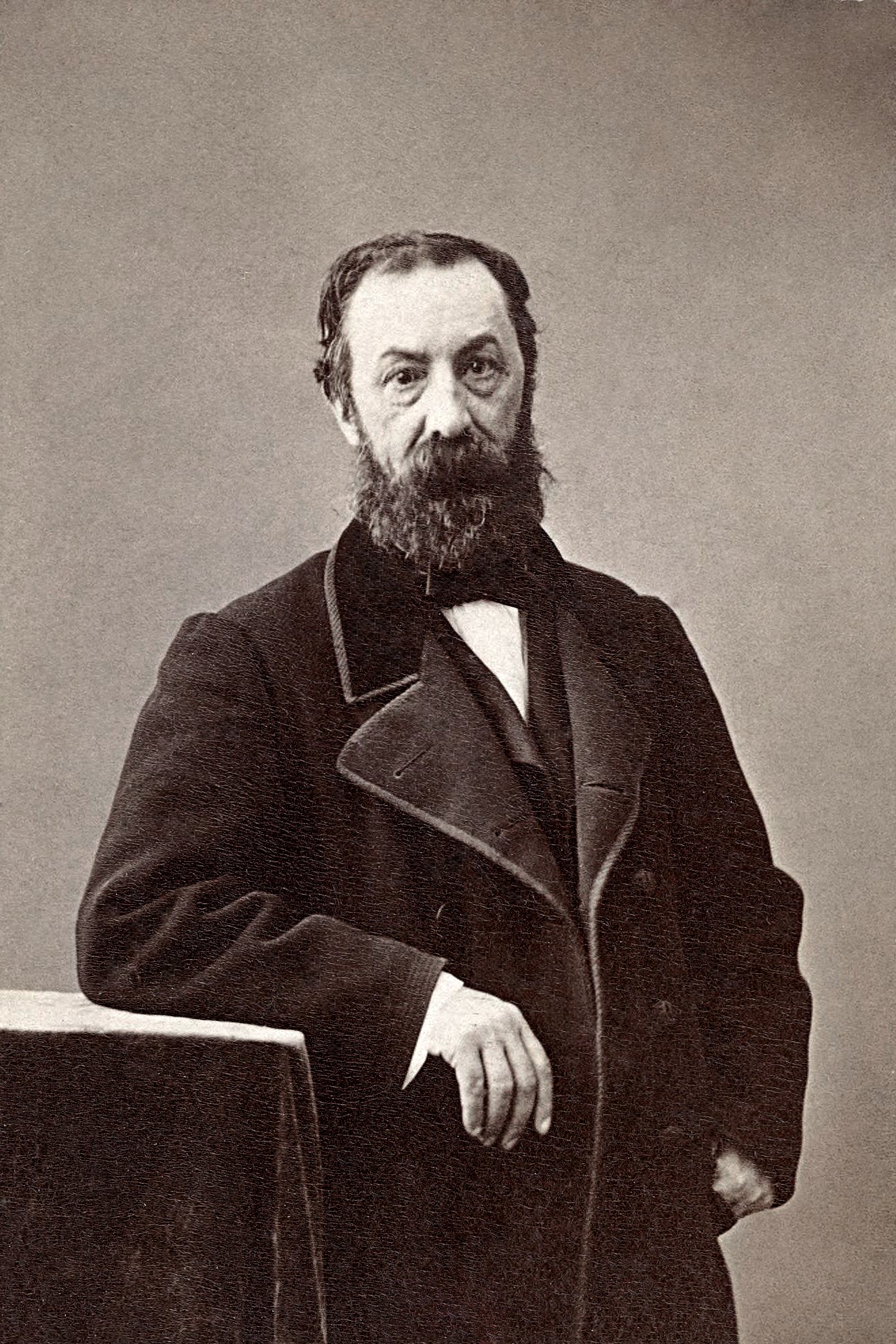 Philibert Audebrand (18015 - 1906), écrivain, chroniqueur et journaliste français.